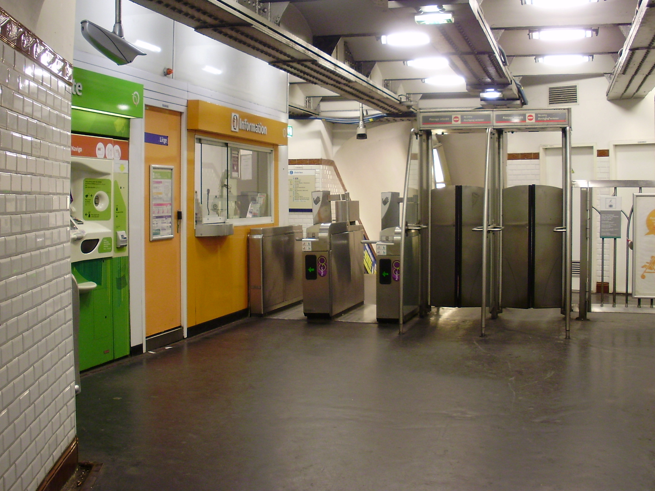 Station Liège du métro de Paris, France : espace de vente des titres de transport.